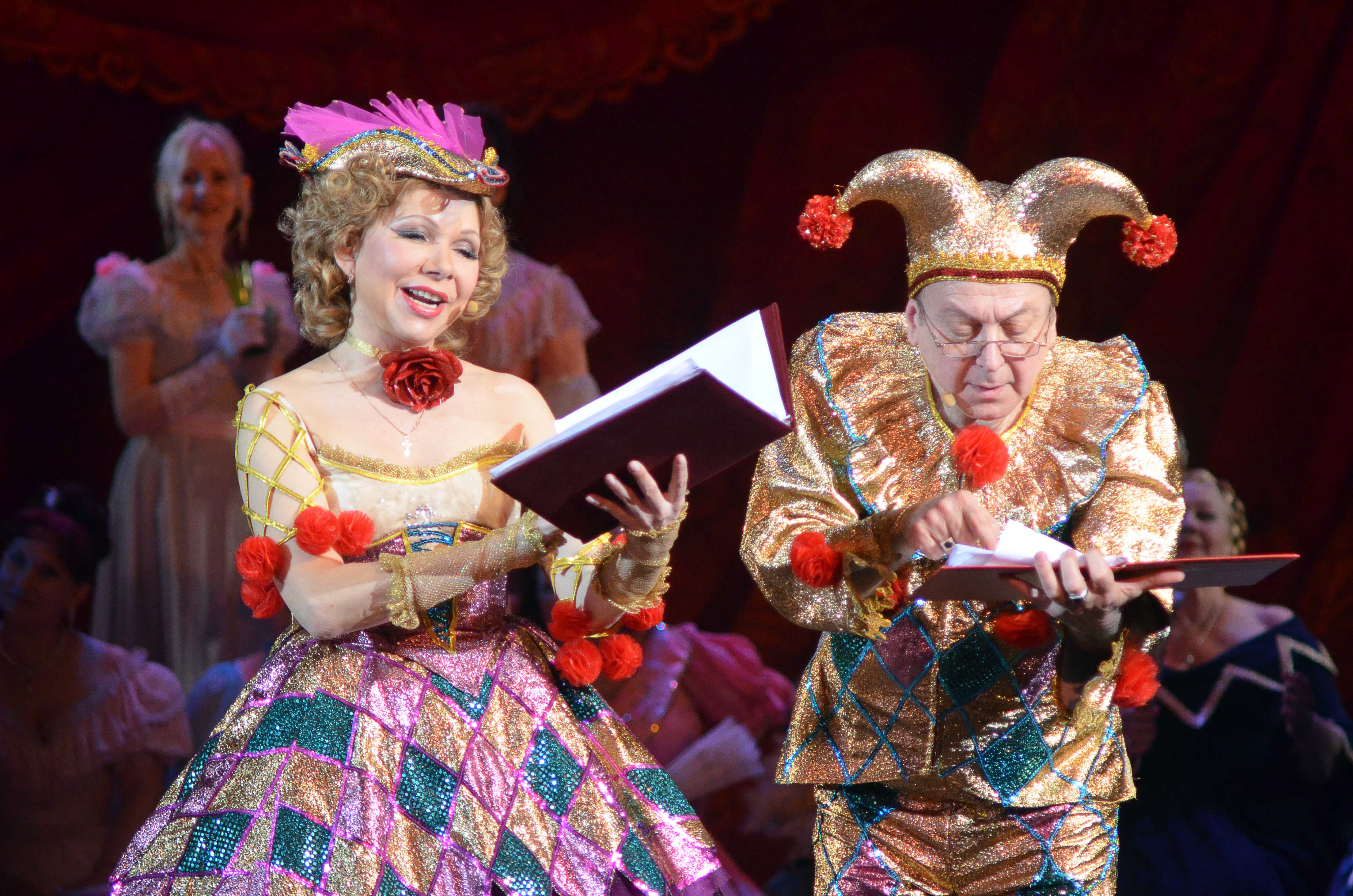 Ведущие VII областного театрального фестиваля "Золотой Арлекин", 2014 год